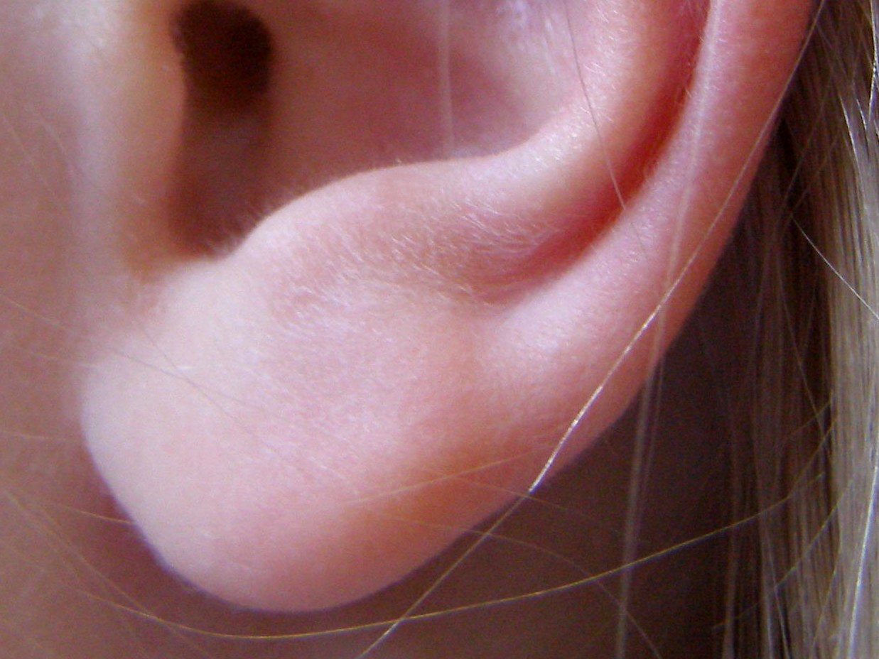 La bildo estas kopiita de en. La originala priskribo estas: ==